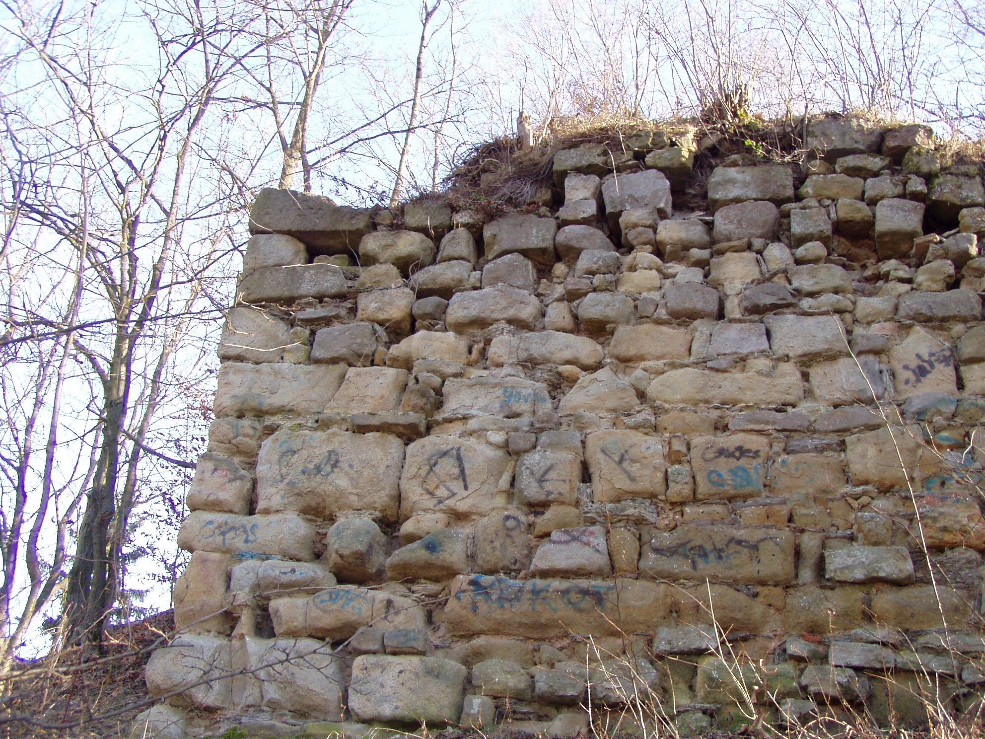 Choutníkovo Hradiště - ruins of castle